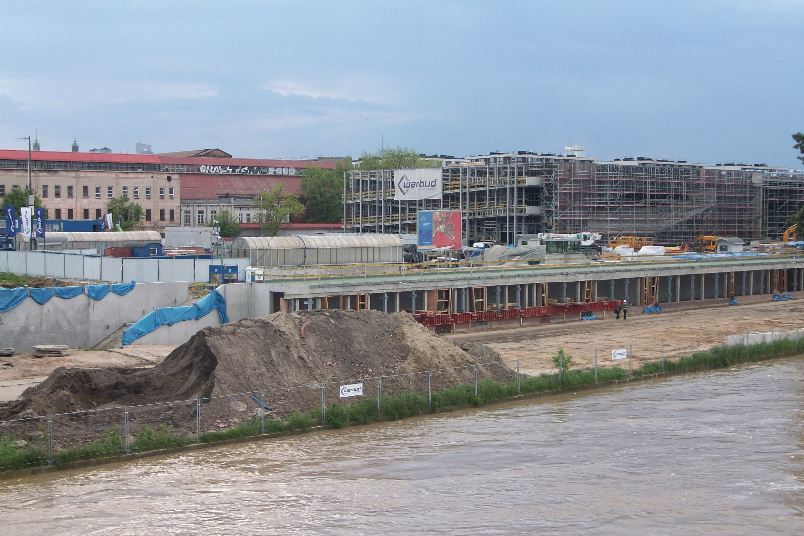 Budowa Centrum Nauki Kopernik w dniu 20 maja 2010 roku podczas wysokiego stanu wody na Wiśle.